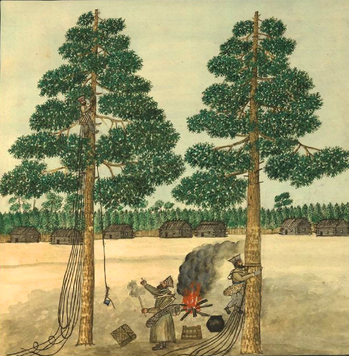 Бортники з Вільшанки. Домінік П'єр де ля Фліз. «Медико-топографічний опис державних маєтностей Київської округи з зображенням деяких природних витворів рослинного і тваринного світу, разом із статистикою кожного села, їхнім виглядом, зробленим з натури, зображенням селянських костюмів та географічною картою Київської округи». Київ, 1854. - с. 916